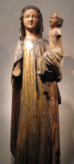 Madona rouchovanská v NG